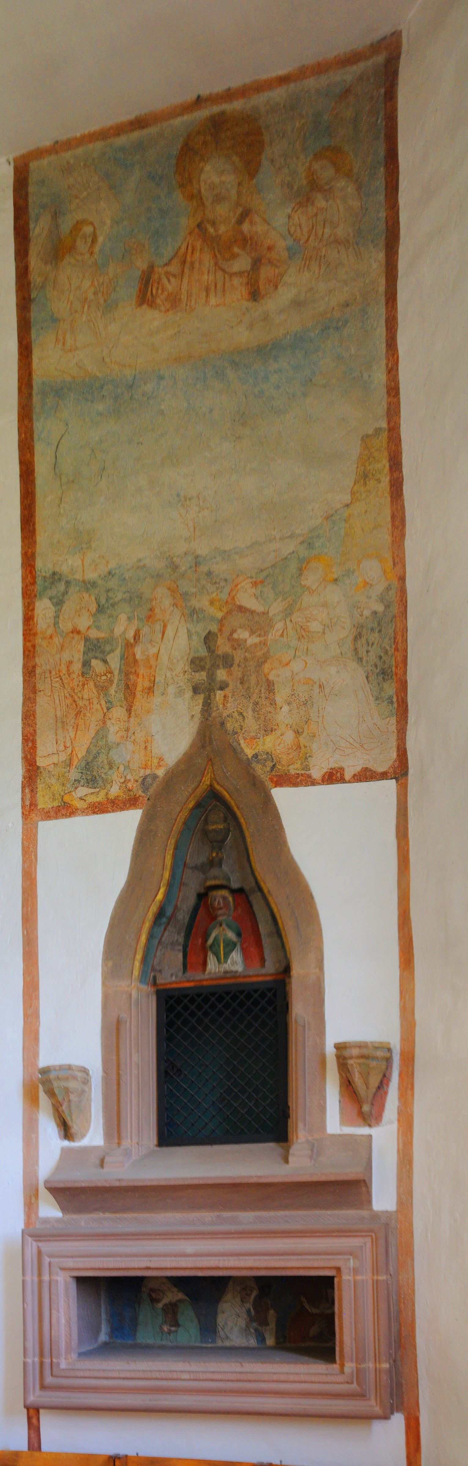 Tüllingen: Sakramentschrein in der Ottilienkirche (Gesamtansicht)